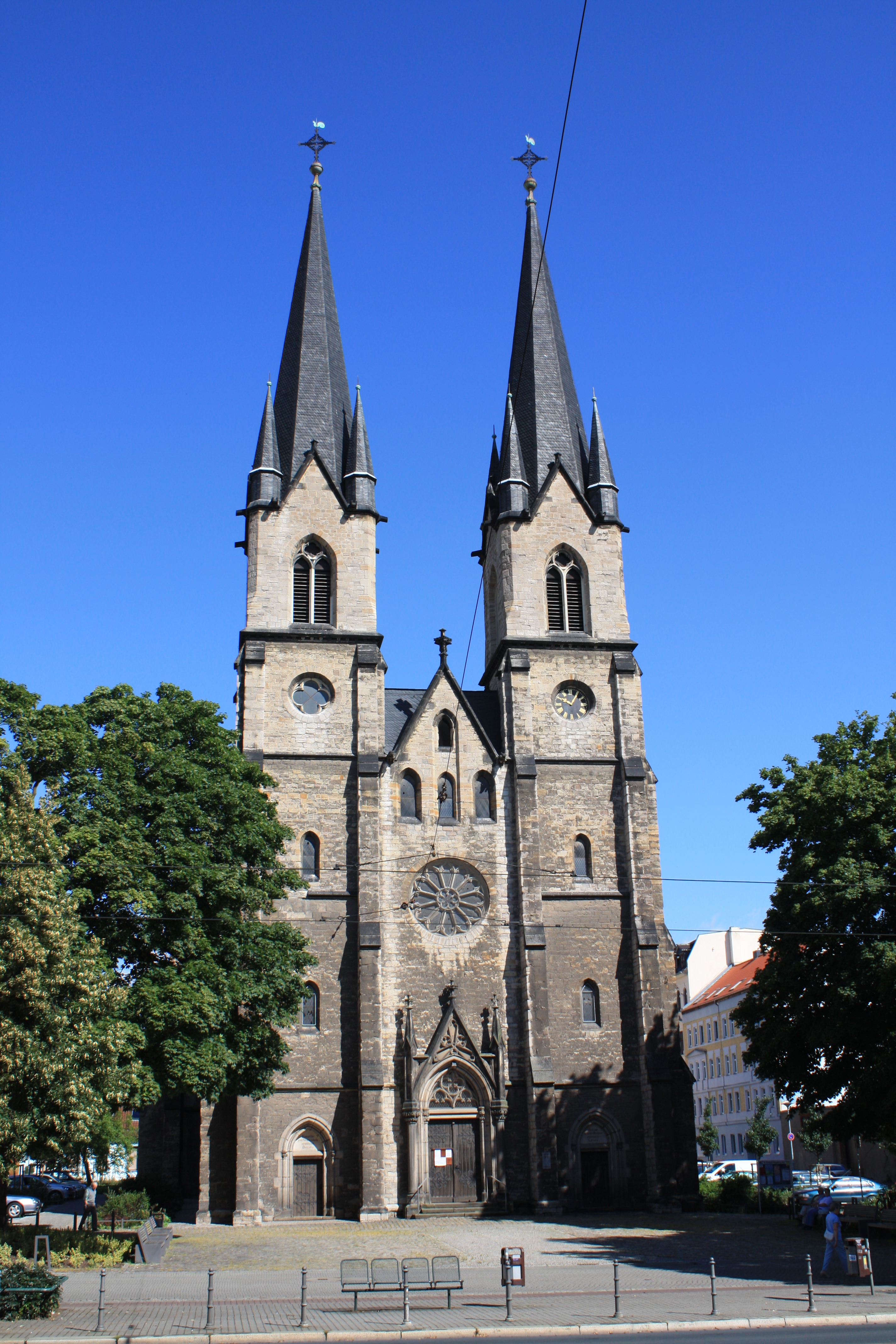 Halberstädterstrasse